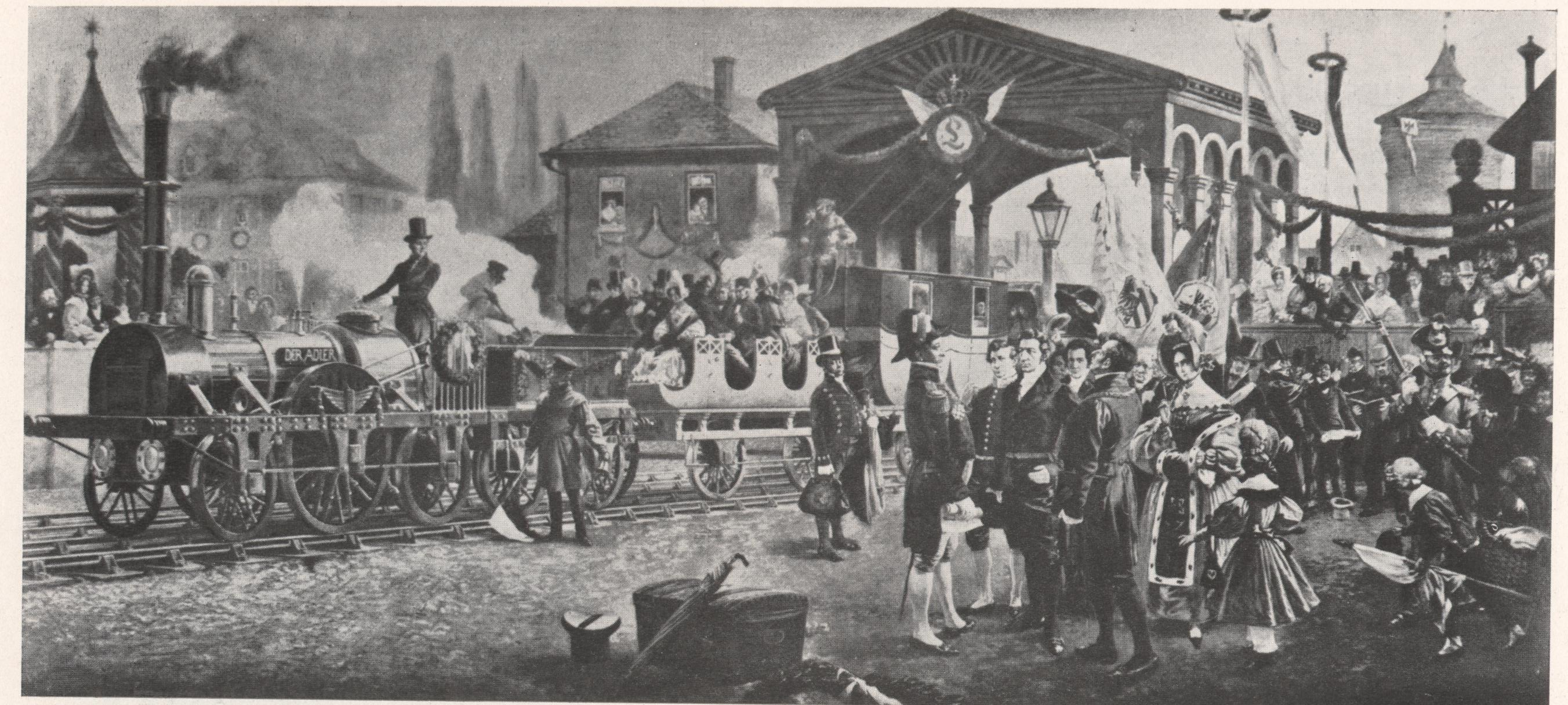 Eröffnung der ersten deutschen Eisenbahn Nürnberg-Fürth, 1835